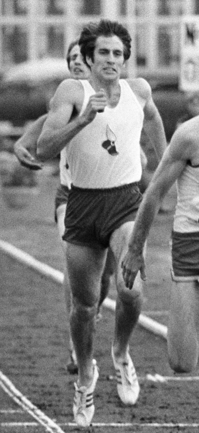 Finish van de 800 meter heren: Marty Liquori